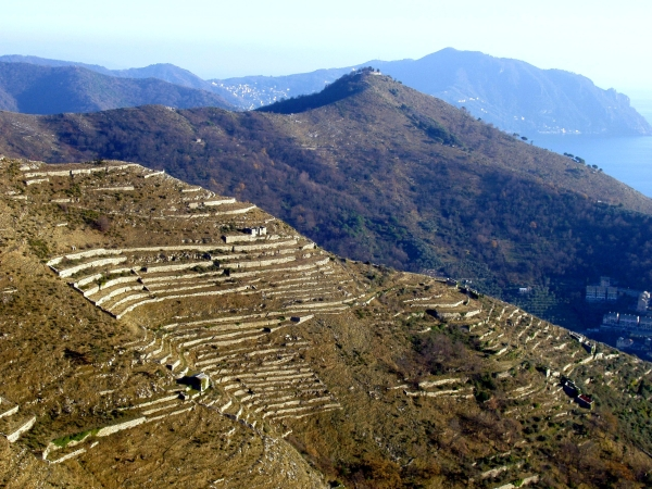 M. Giugo